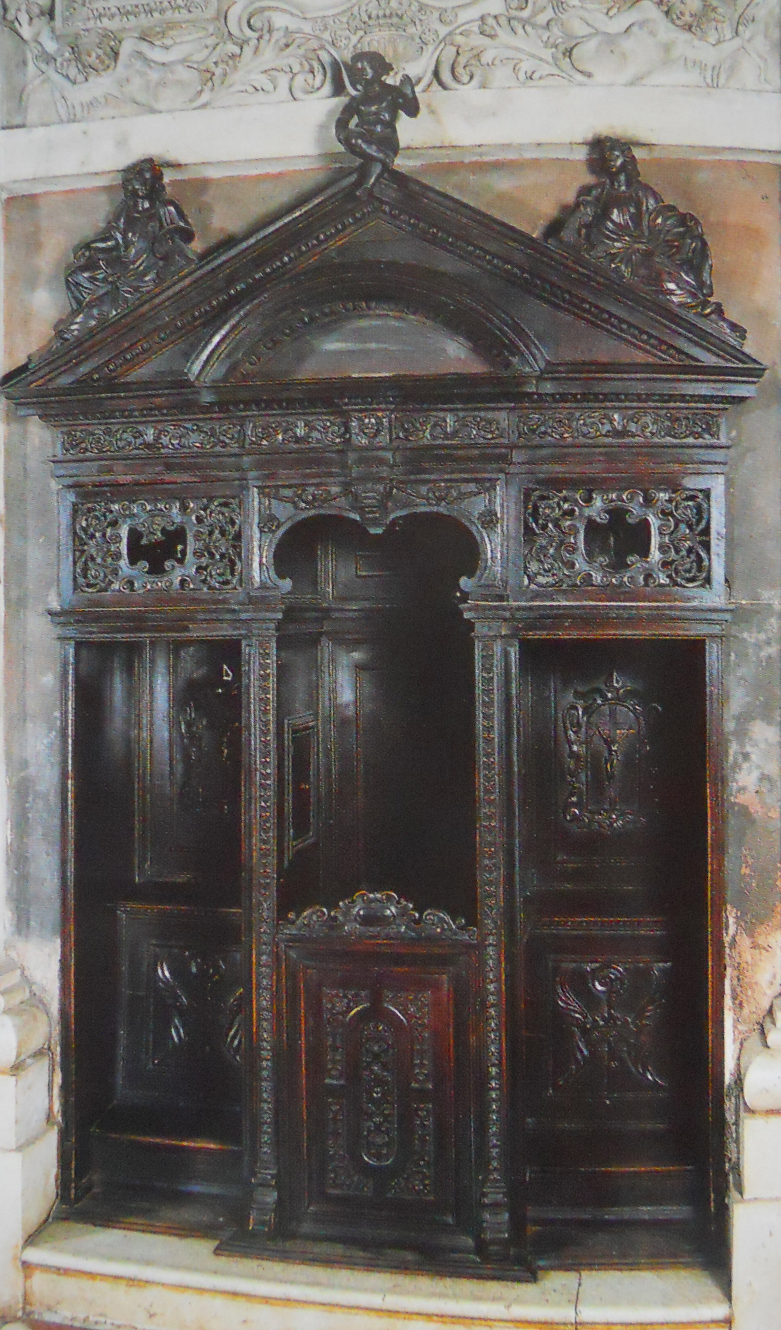 San Faustino maggiore (Brescia), un confessionale